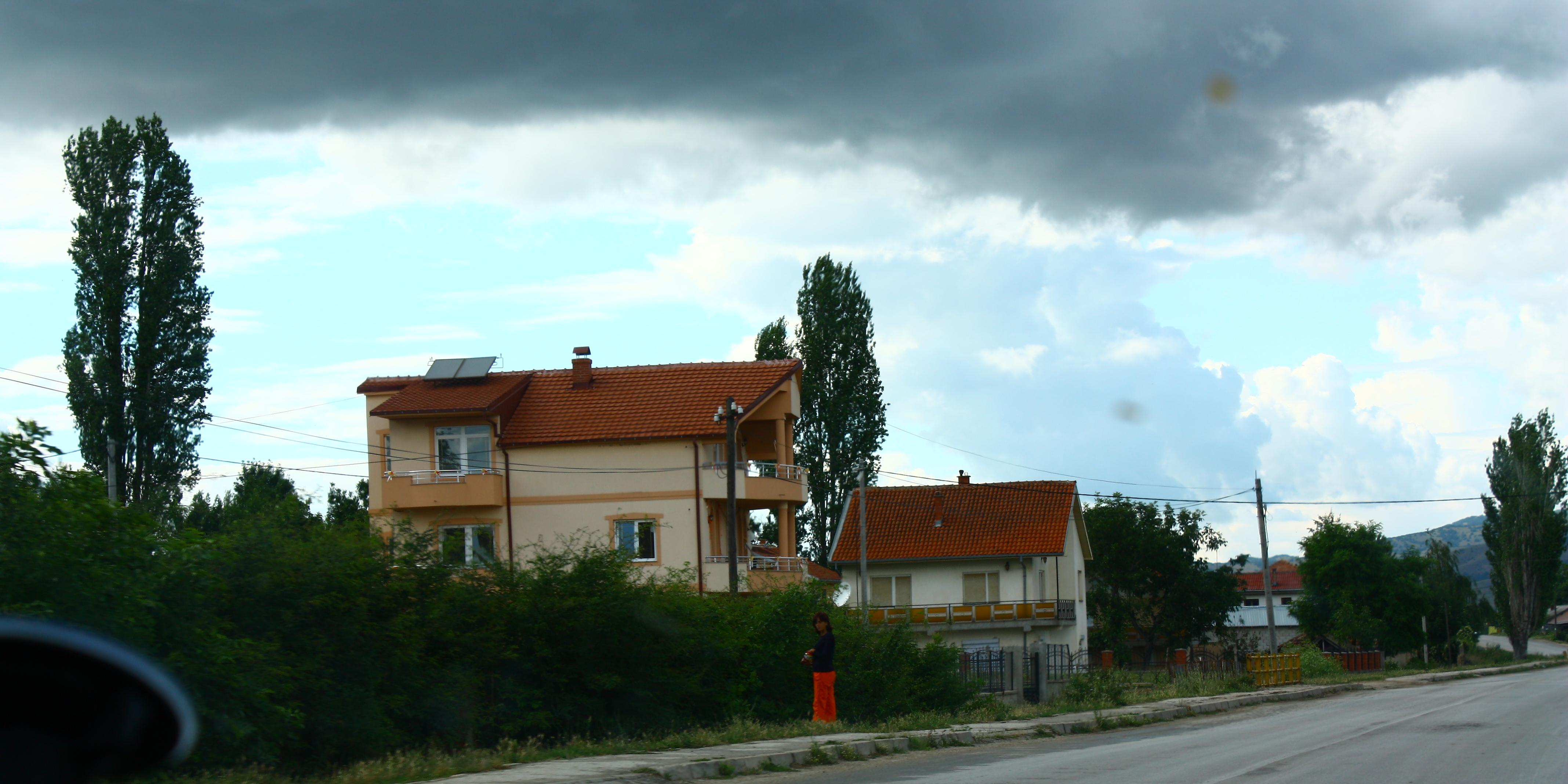 Kukurečani, Macedonia